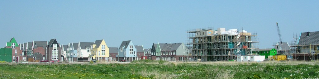 De in 2006 nieuwe wijk Bangert en Oosterpolder, in Hoorn/Zwaag. The in 2006 new build district of Zwaag/Hoorn: Bangert en Oosterpolder.